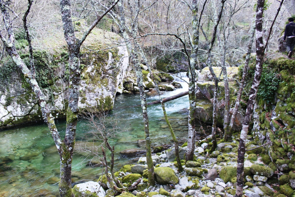 Rio Bestança - Açoreira